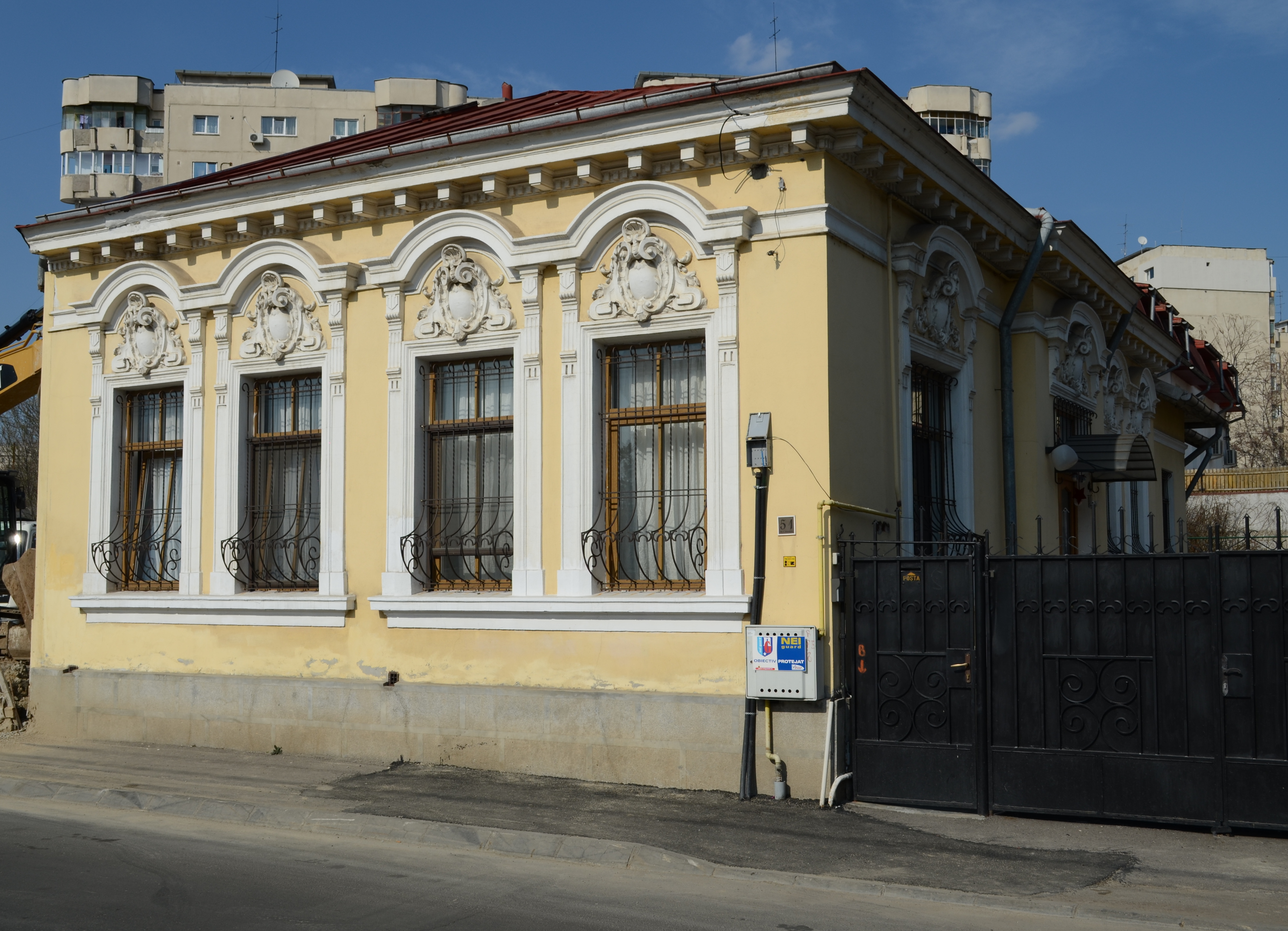 Casă, Str. Ion Minulescu nr. 51